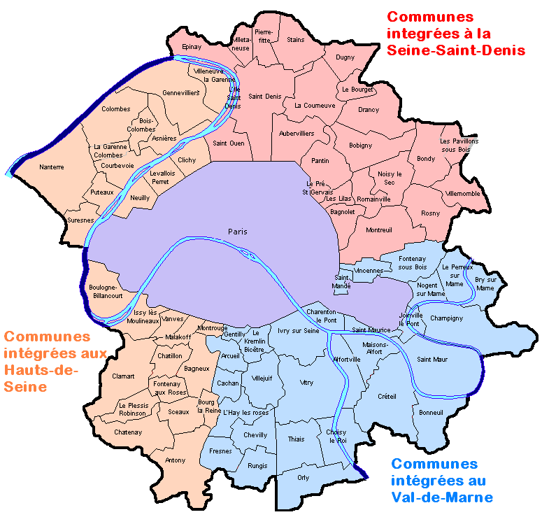 traduit de en:, où l'image a été créé par Hardouin Image:Seine-1968.png